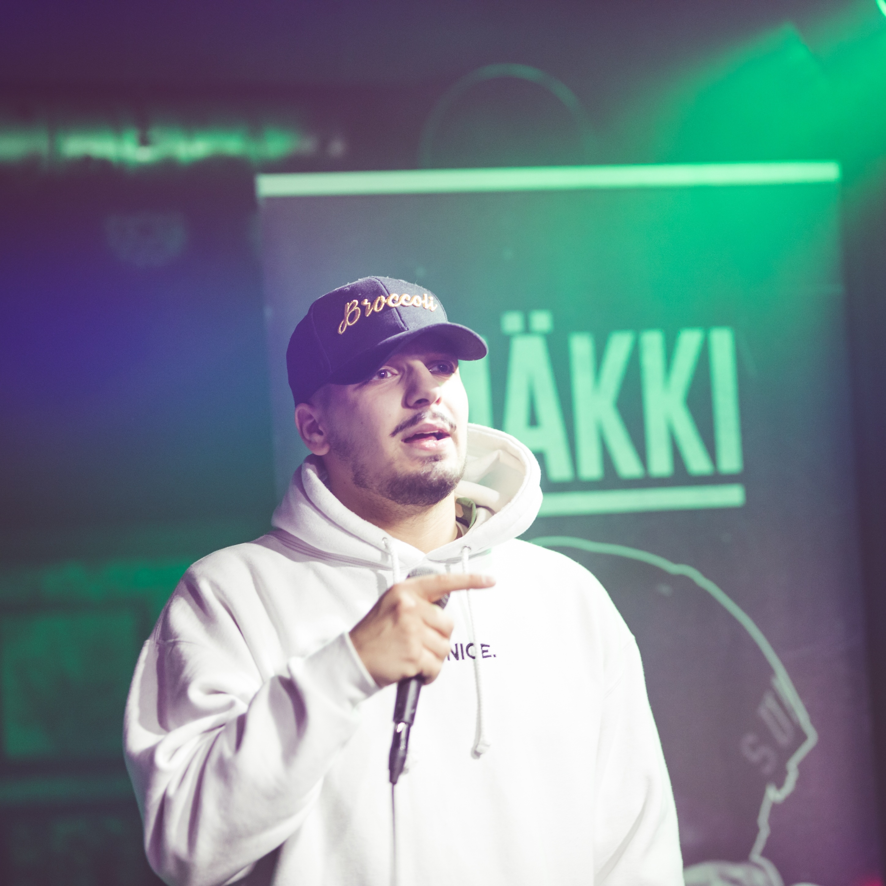 Jedidi